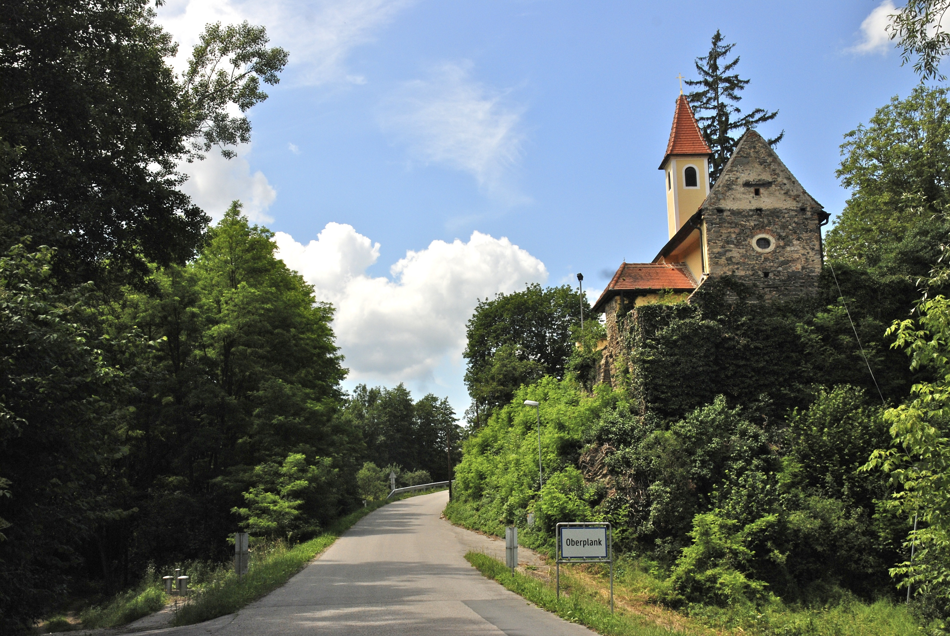 Blick auf die Kapelle in Oberplank (Plank am Kamp)